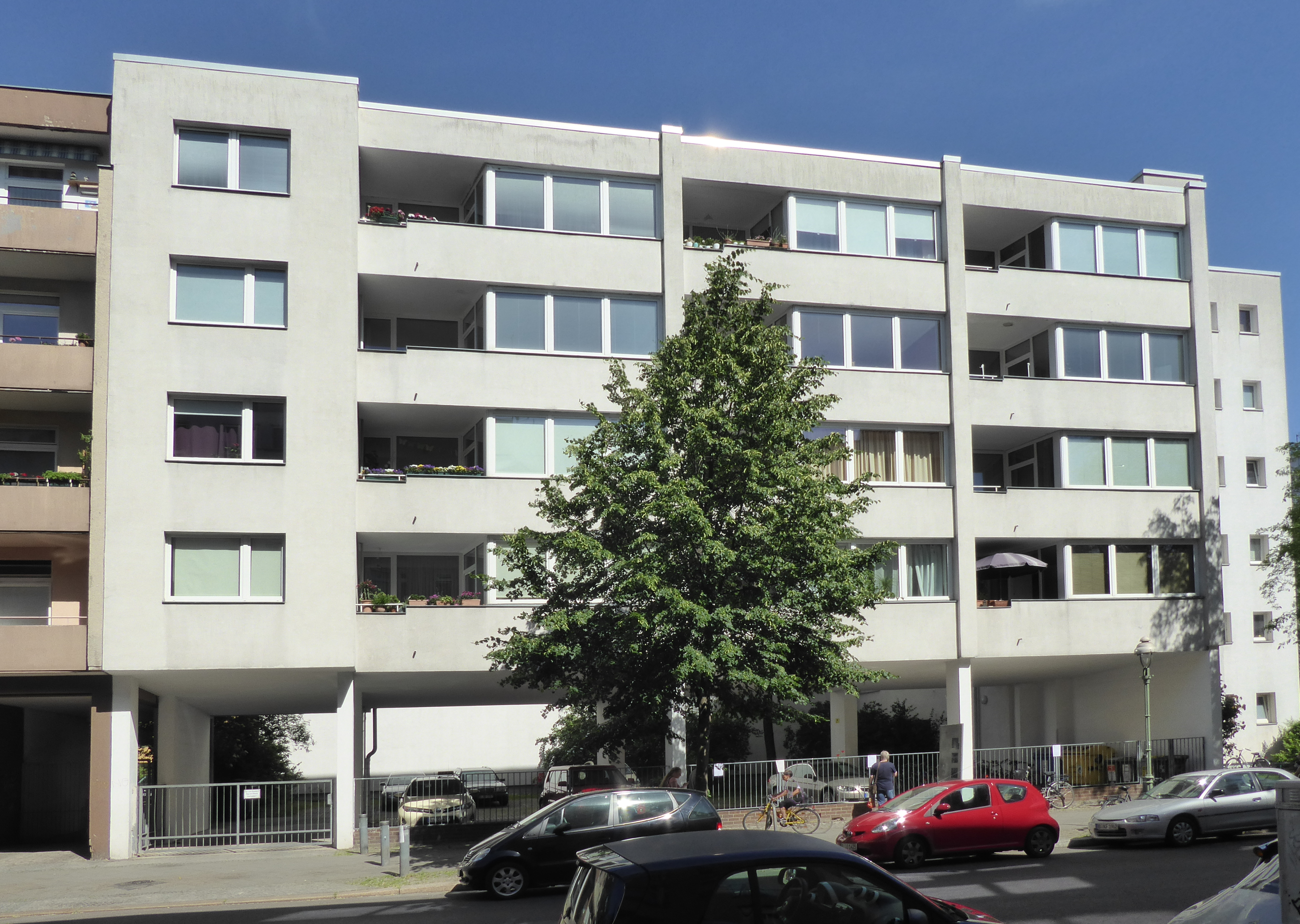 Charlottenburg Krumme Straße 66 Gesamtansicht